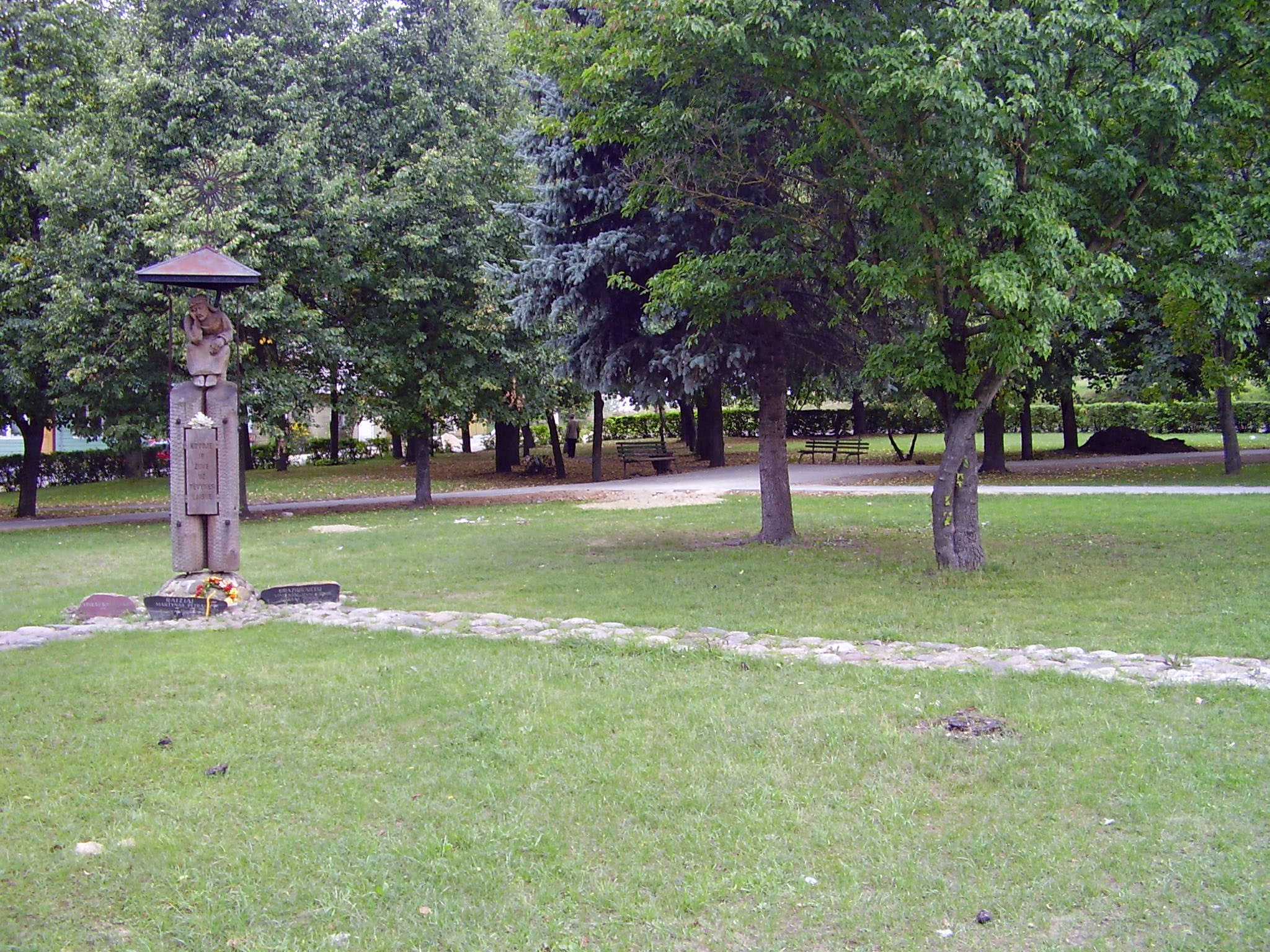 Aikštė Stakliškių centre. Mano daryta nuotrauka. Foto: amonas, 2006 m. rugpjūčio 12 d.